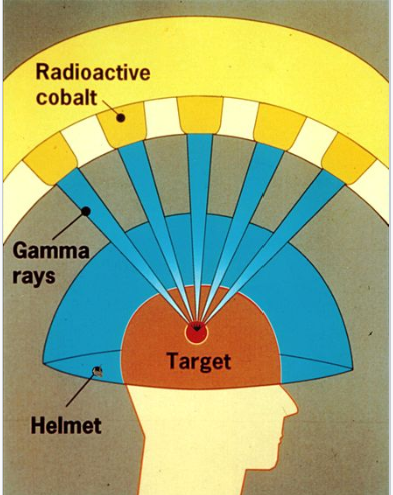 תיאור גרפי של סכין גמא (לקסל)